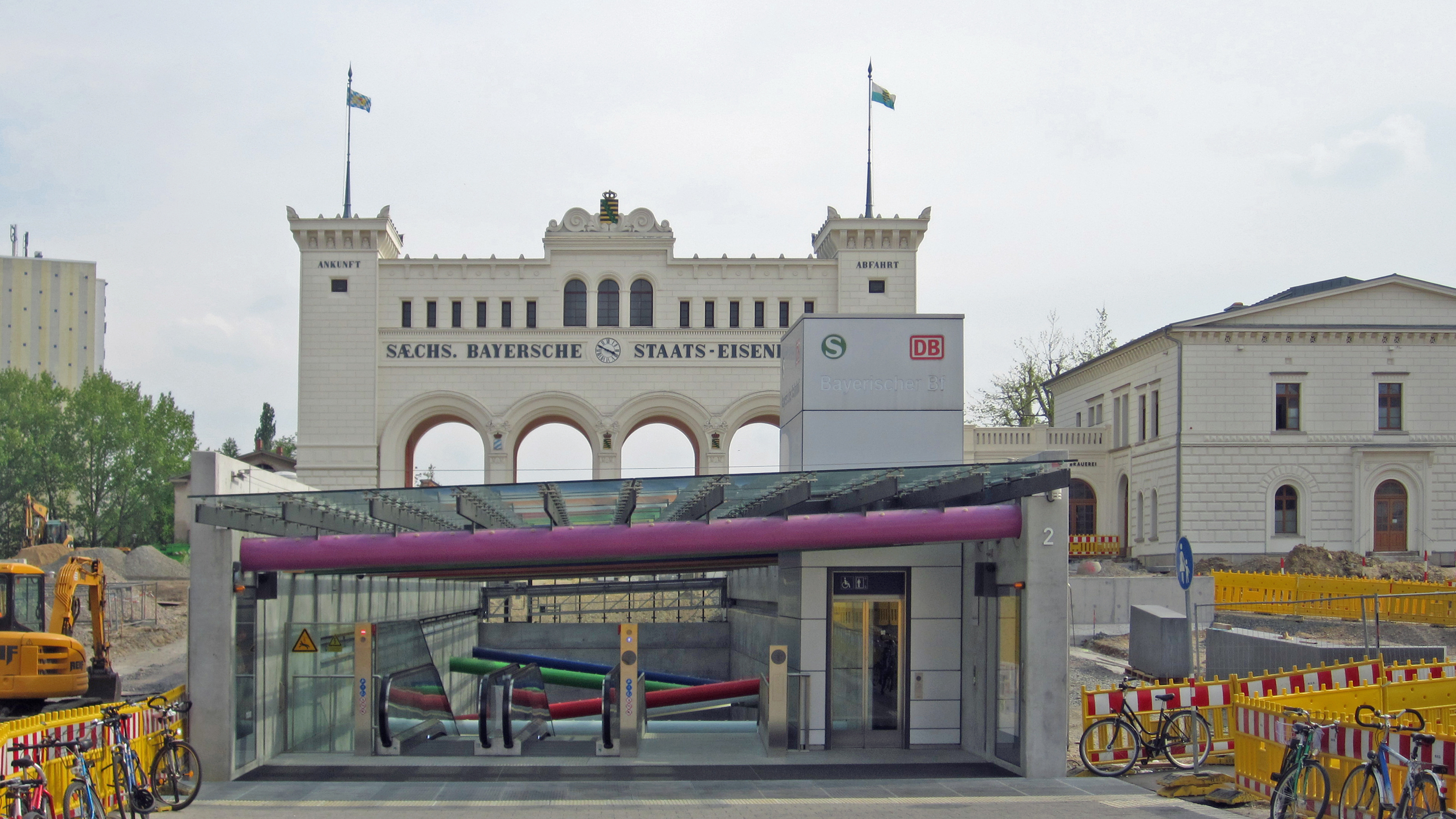 Zugang zur City-Tunnel-Station Bayerischer Bahnhof mit Portikus und Schalterhalle im Hintergrund.